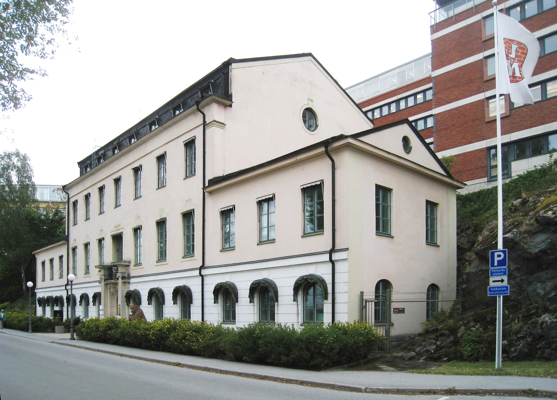 "Vita huset" vid Alviks Strand, Gustavslundsvägen 147, Alvik, Bromma, Stockholm. Byggnaden var från början mjölksyrafabrik (från 1895-1900), sedan från Barnängens Tekniska Fabriks huvudkontor (från 1930), sedan Alfa-Lavals huvudkontor (från 1983). Idag har andra företag sina kontor där.